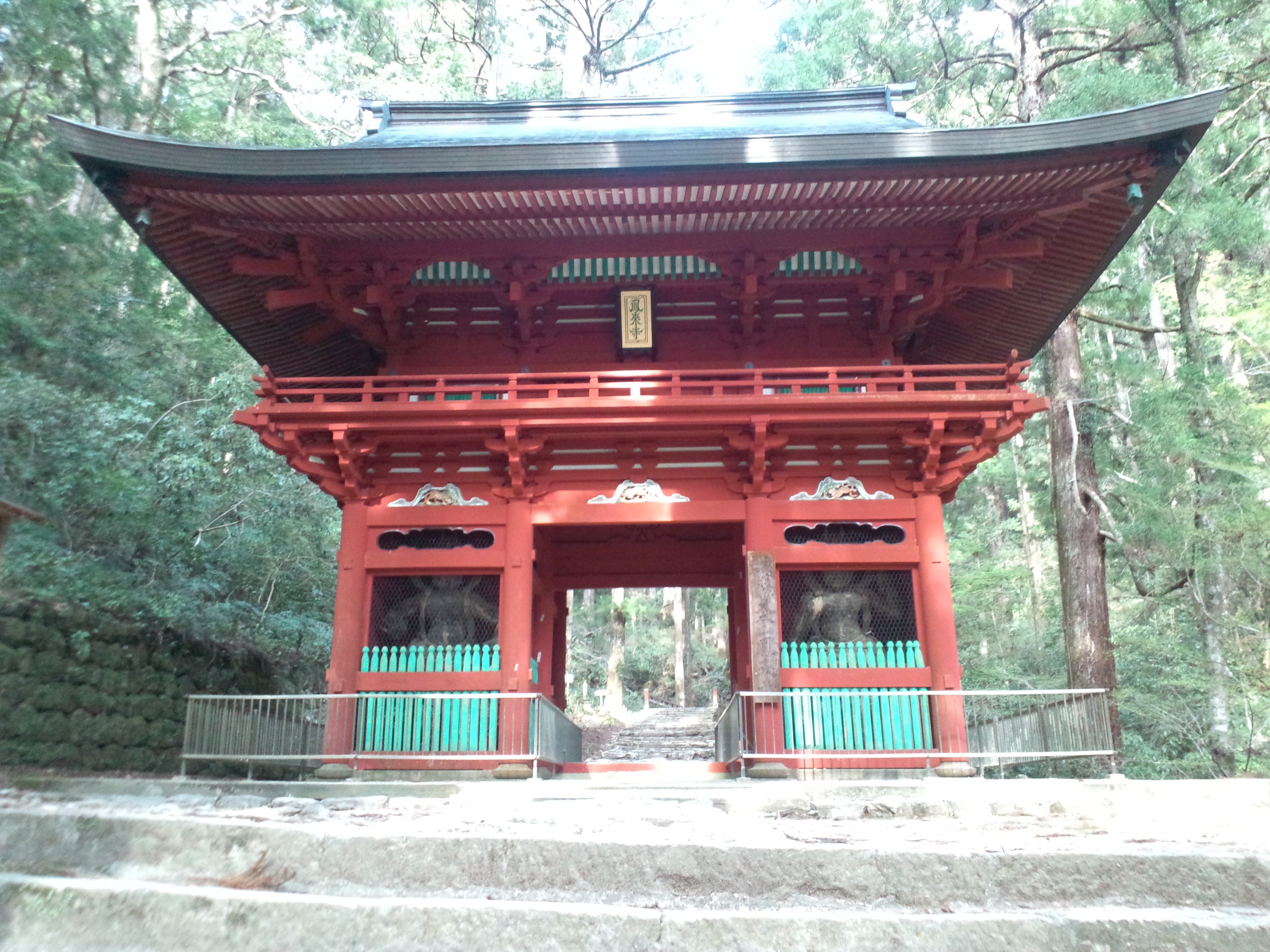 鳳来寺山 仁王門